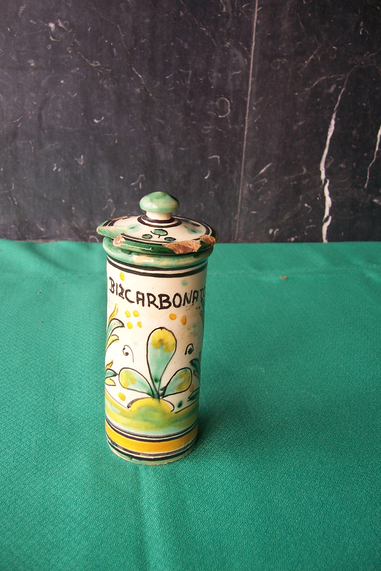 Recipiente para bicarbonato. Cerámica de Puente del Arzobispo (Toledo). Comprado en la Feria de San Isidro de Madrid.